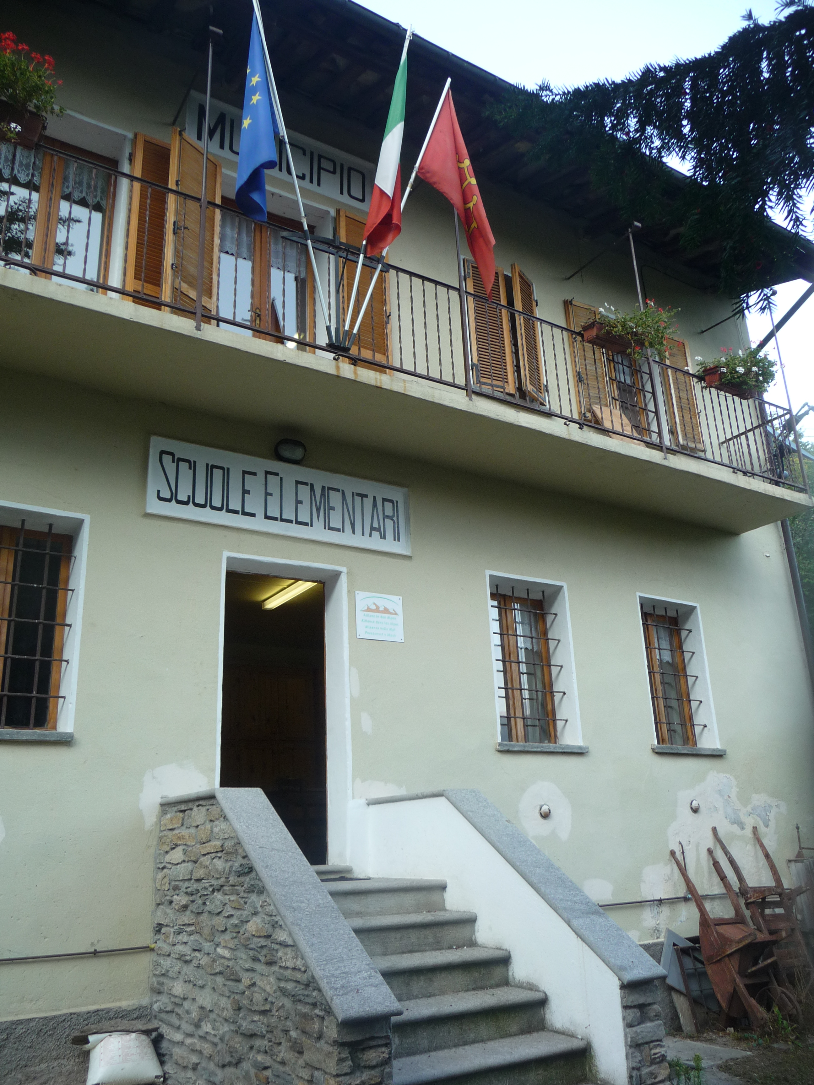 Comune di Massello